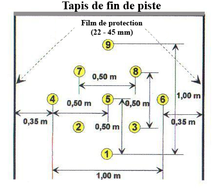 Plateaux de reception des quilles